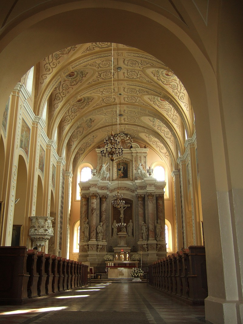 Turgelių Švč. Mergelės Marijos Ėmimo į dangų bažnyčios interjeras